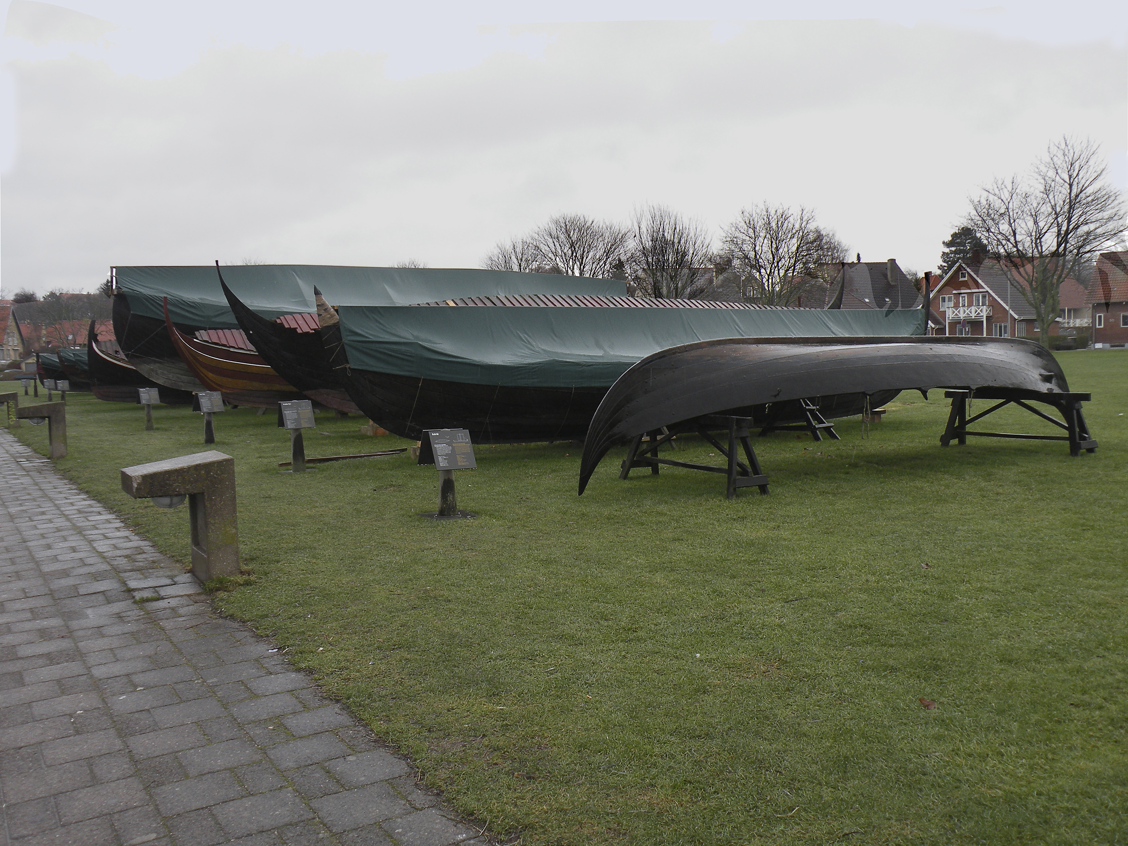 Корабли викингов (реконструкция)